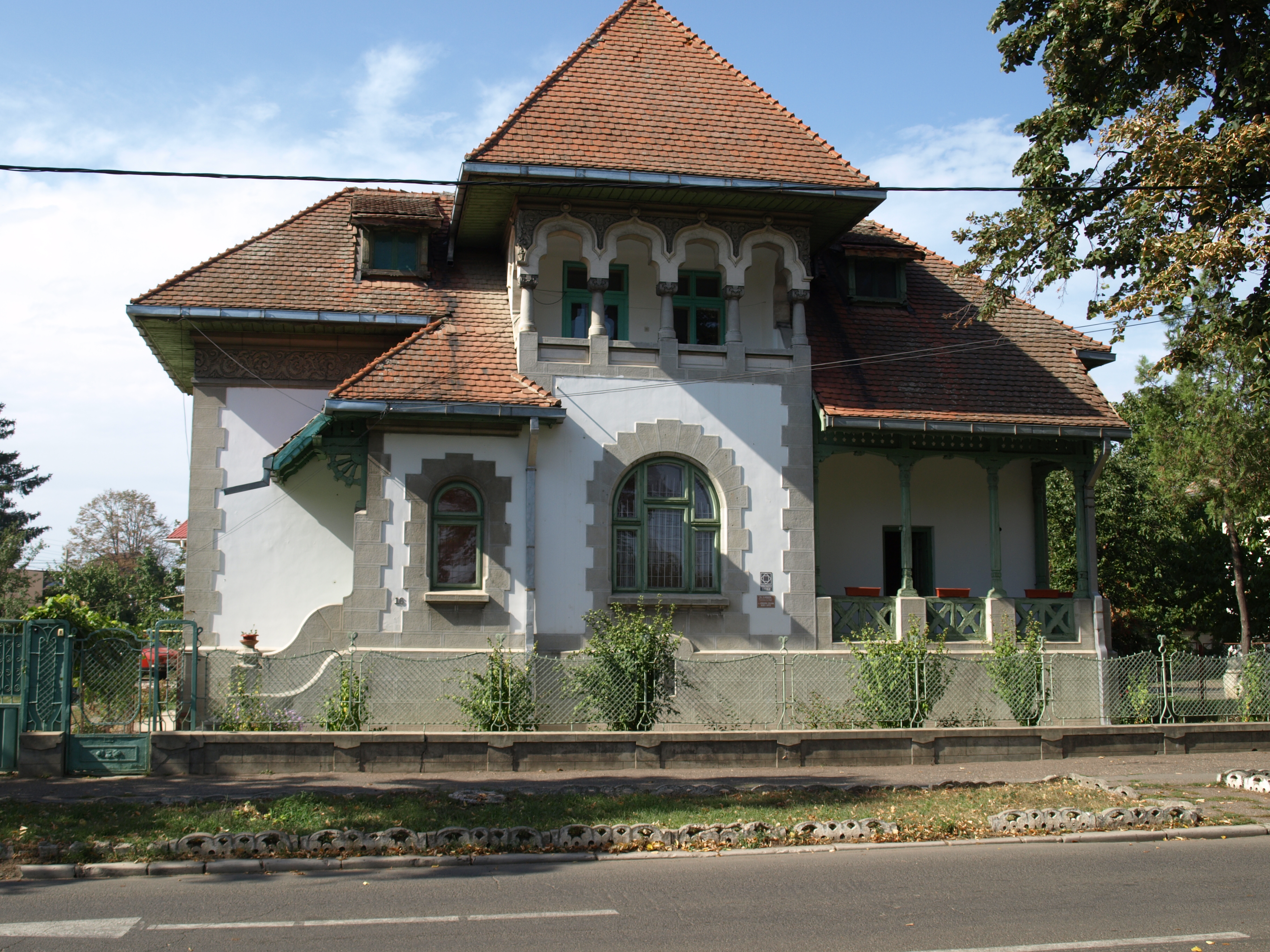 Casa Șerban Neniță